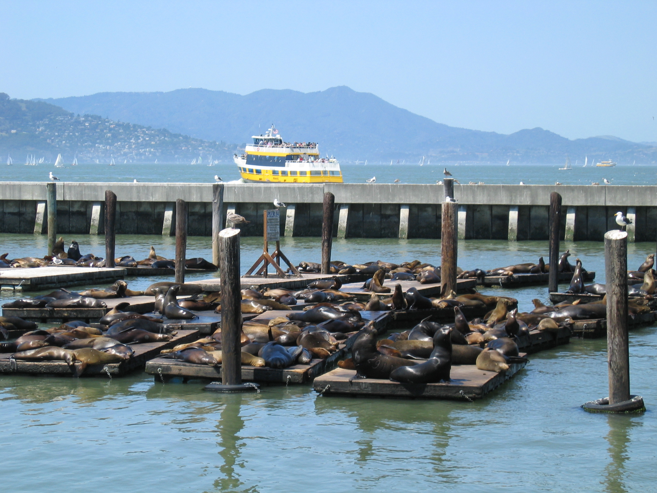 Seeloewen an Pier 39 von Fisherman's Wharf